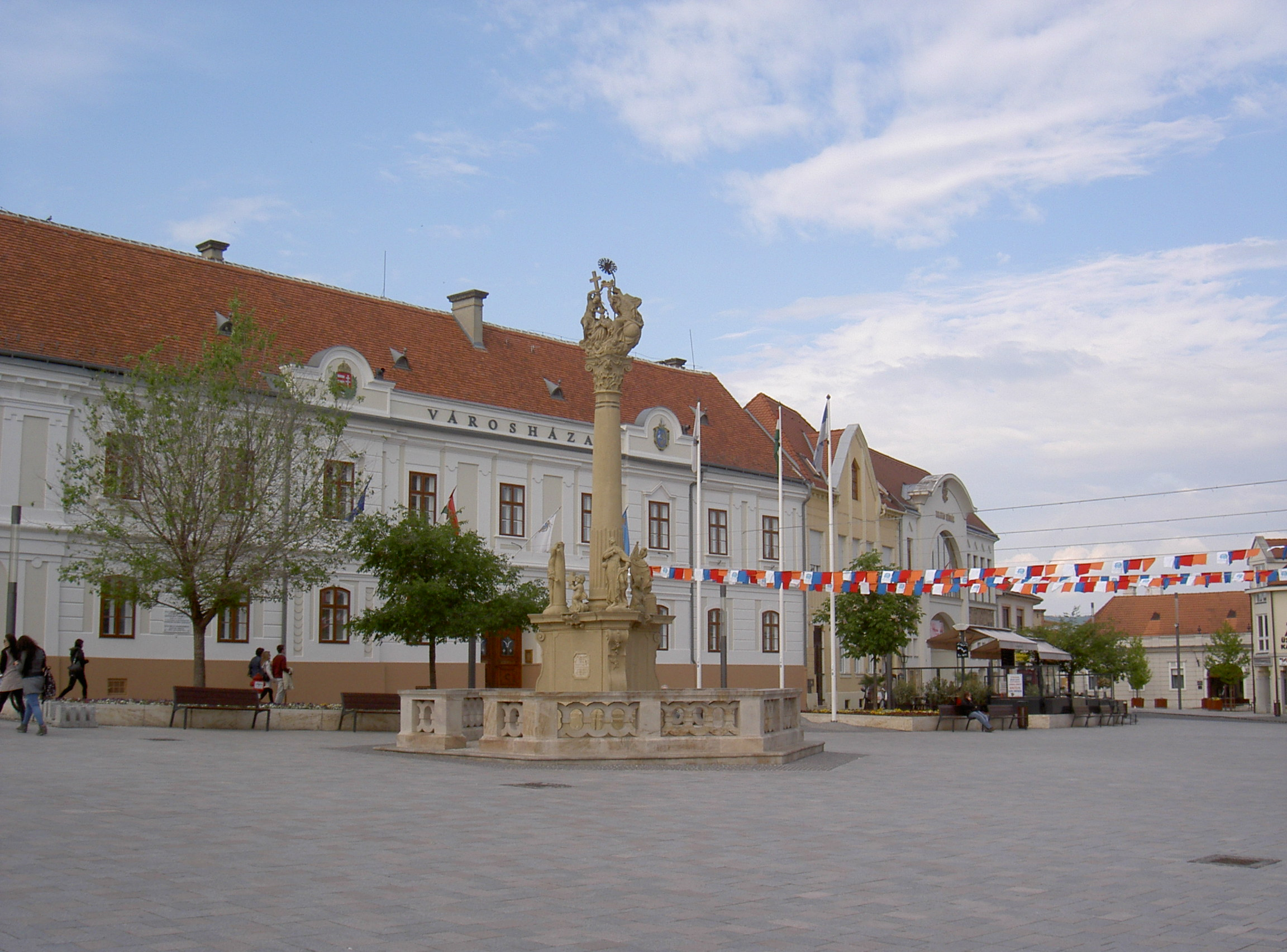 Stadthaus in Keszthely